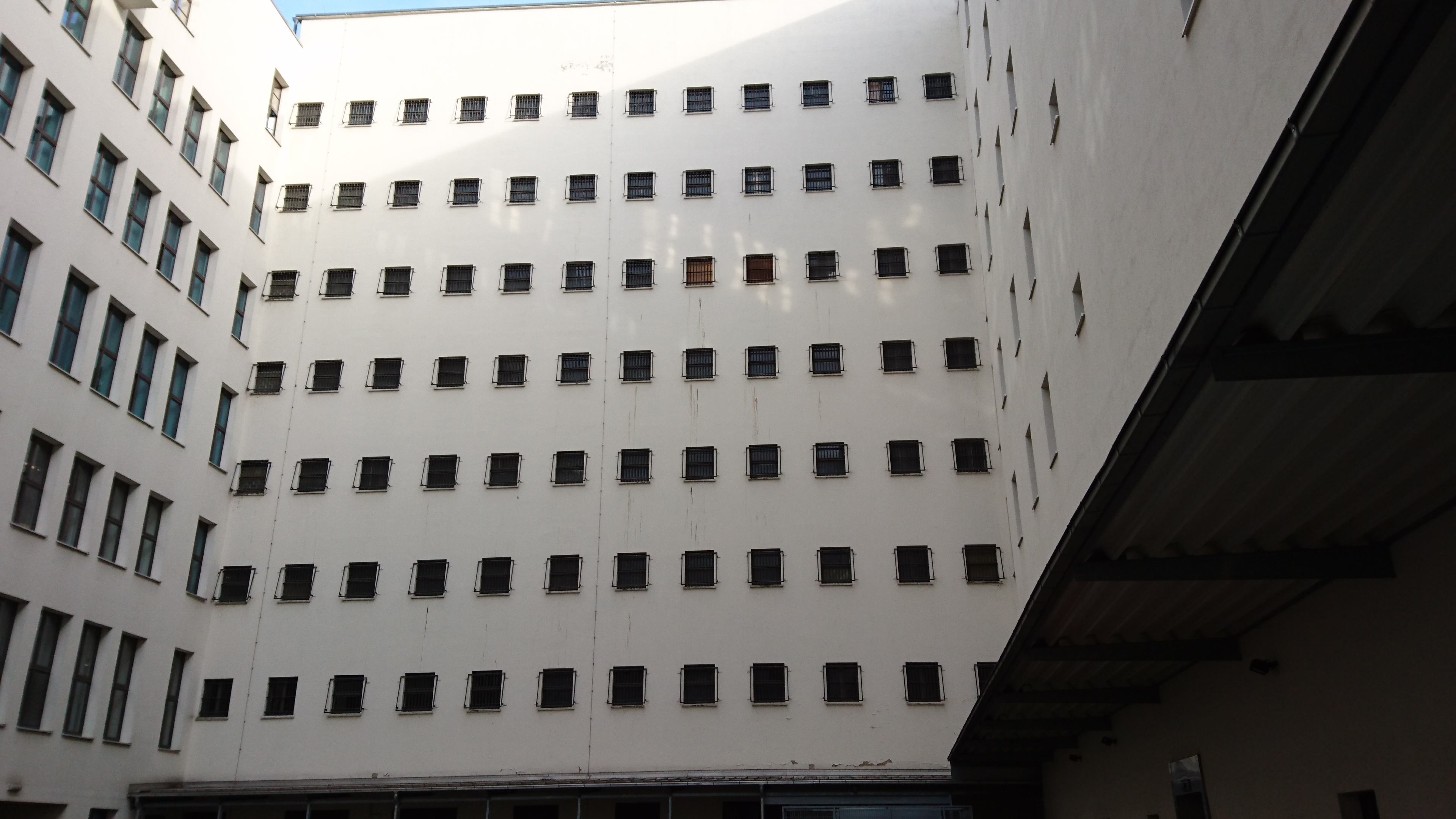 Heutige Außenansicht der ehemaligen Untersuchungshaftanstalt II